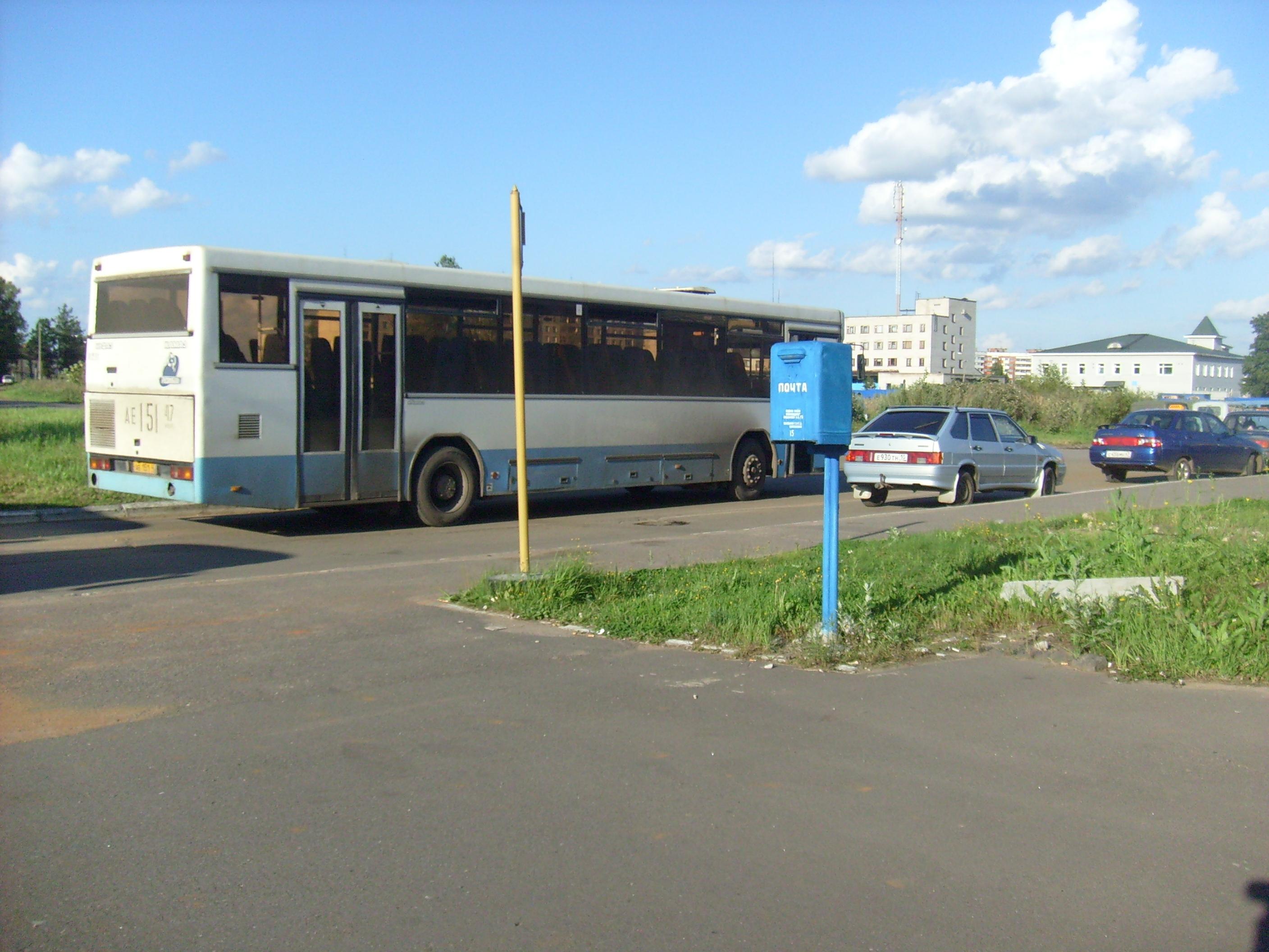 Автобус 141 маршрута на Привокзальной площади г. Тихвина Парк: ООО "Пассажиравтотранс" Госномер: АЕ 151 47 Модель: НефАЗ-5299-10-01 (5299A0) Шасси: КамАЗ-5297 Построен: 2003